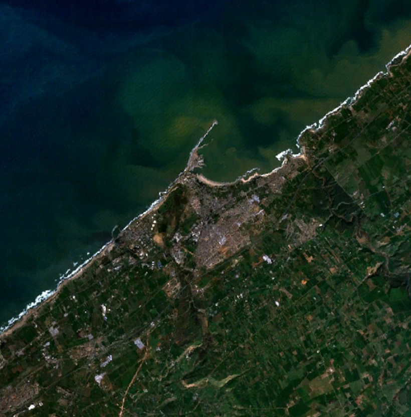 Mohammedia, Morocco